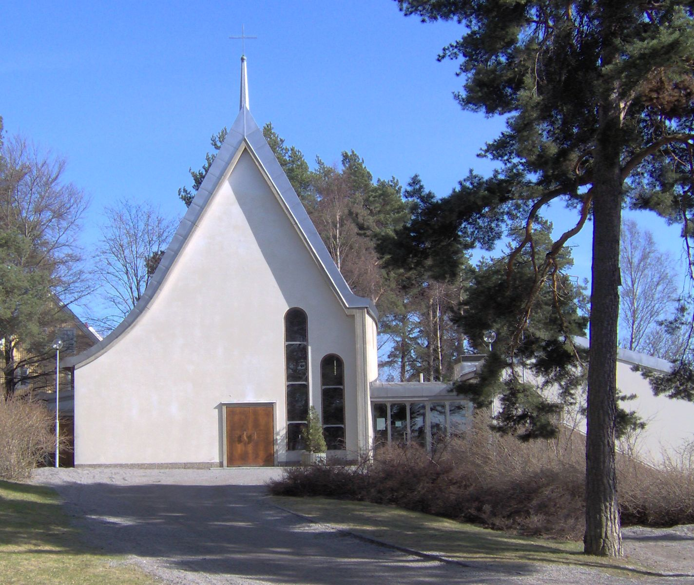 Alla Helgons kyrka i Östertälje i södra Storstockholm.